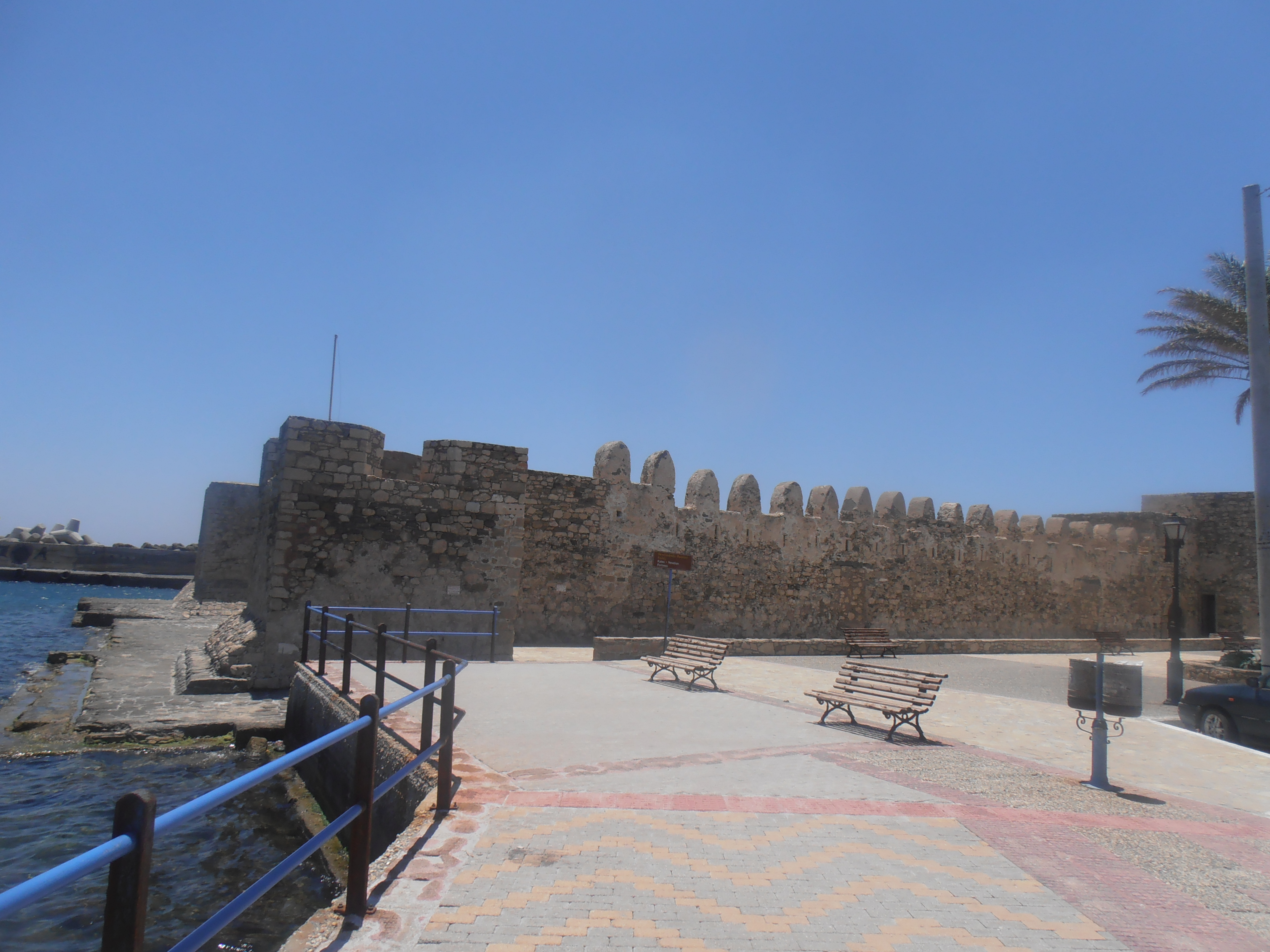 To βενετσιάνικο κάστρο Καλές στην Ιεράπετρα.